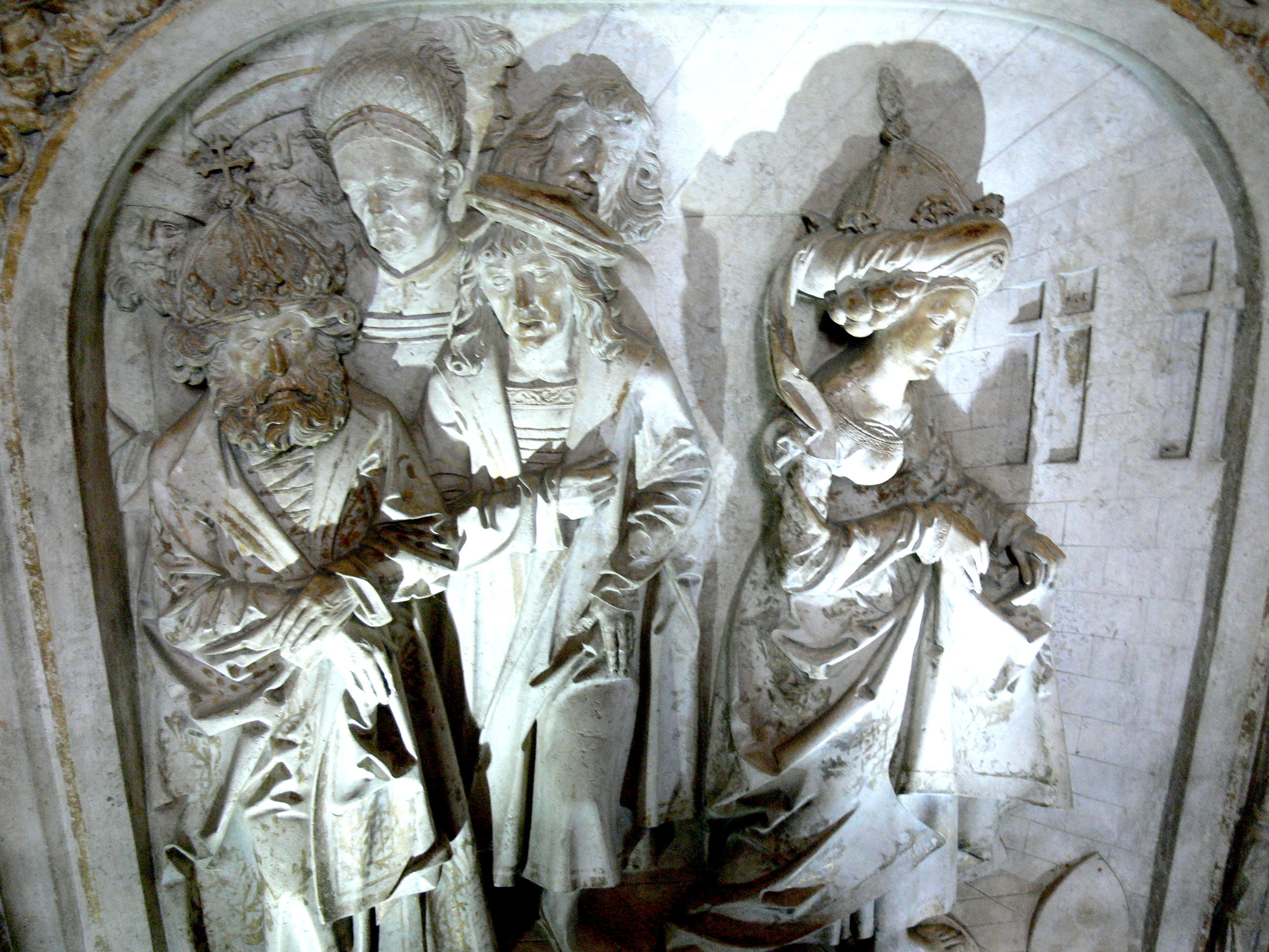 Grab Kaiser Heinrich II. ( 1499 ) im Bamberger Dom: Kaiserin Kunigunde besteht die Prüfung ihrer ehelichen Treue durch einen Gang über glühende Pflugscharen